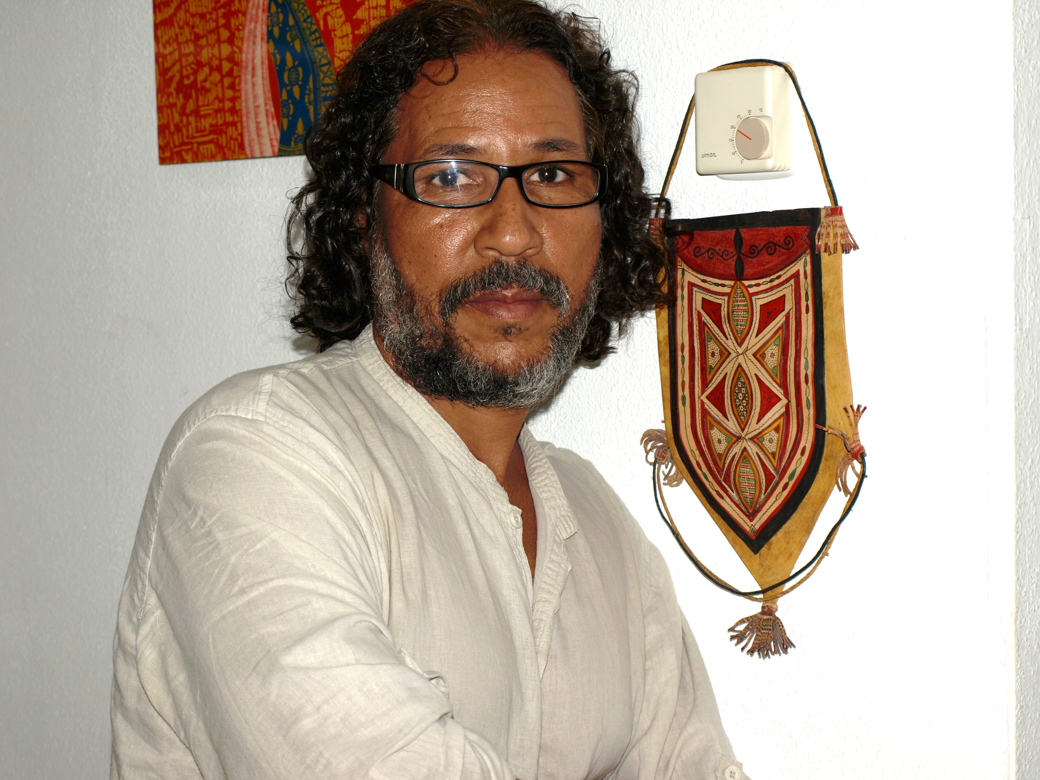 El Escritor Saharaui Bahia Mahmud Awah